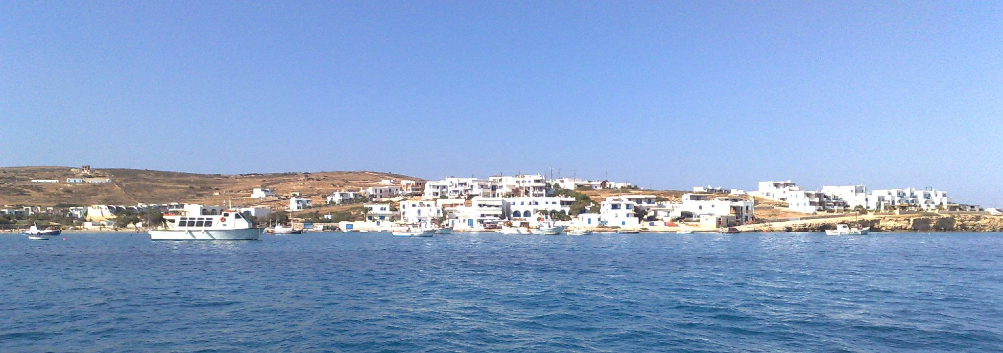 Village on Pano Koufonisi, Small Cyclades